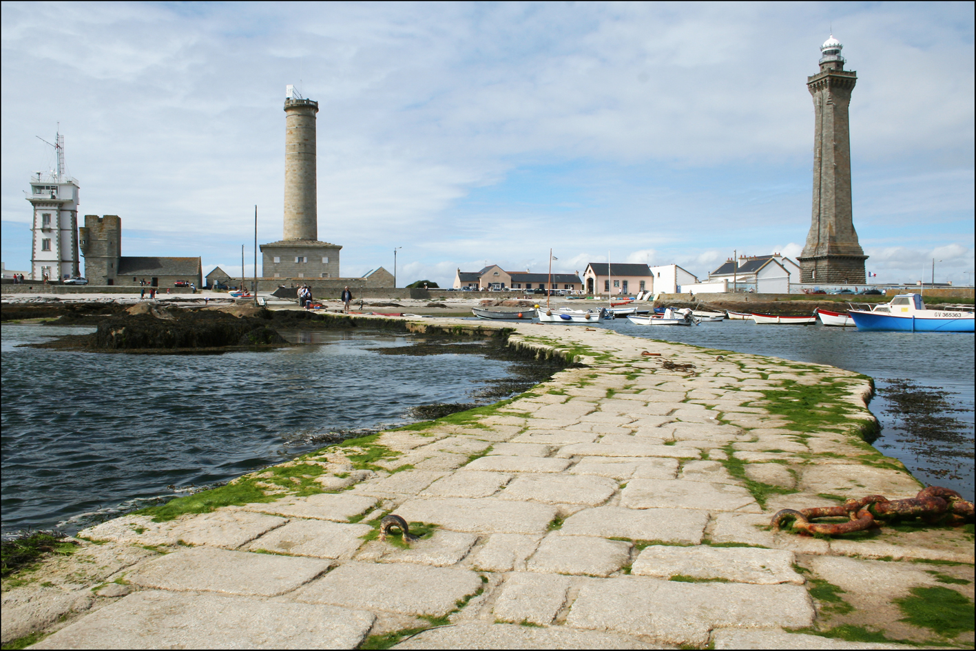 Phare d'Eckmühl vu de la jetée sur la pointe de Penmar'ch .